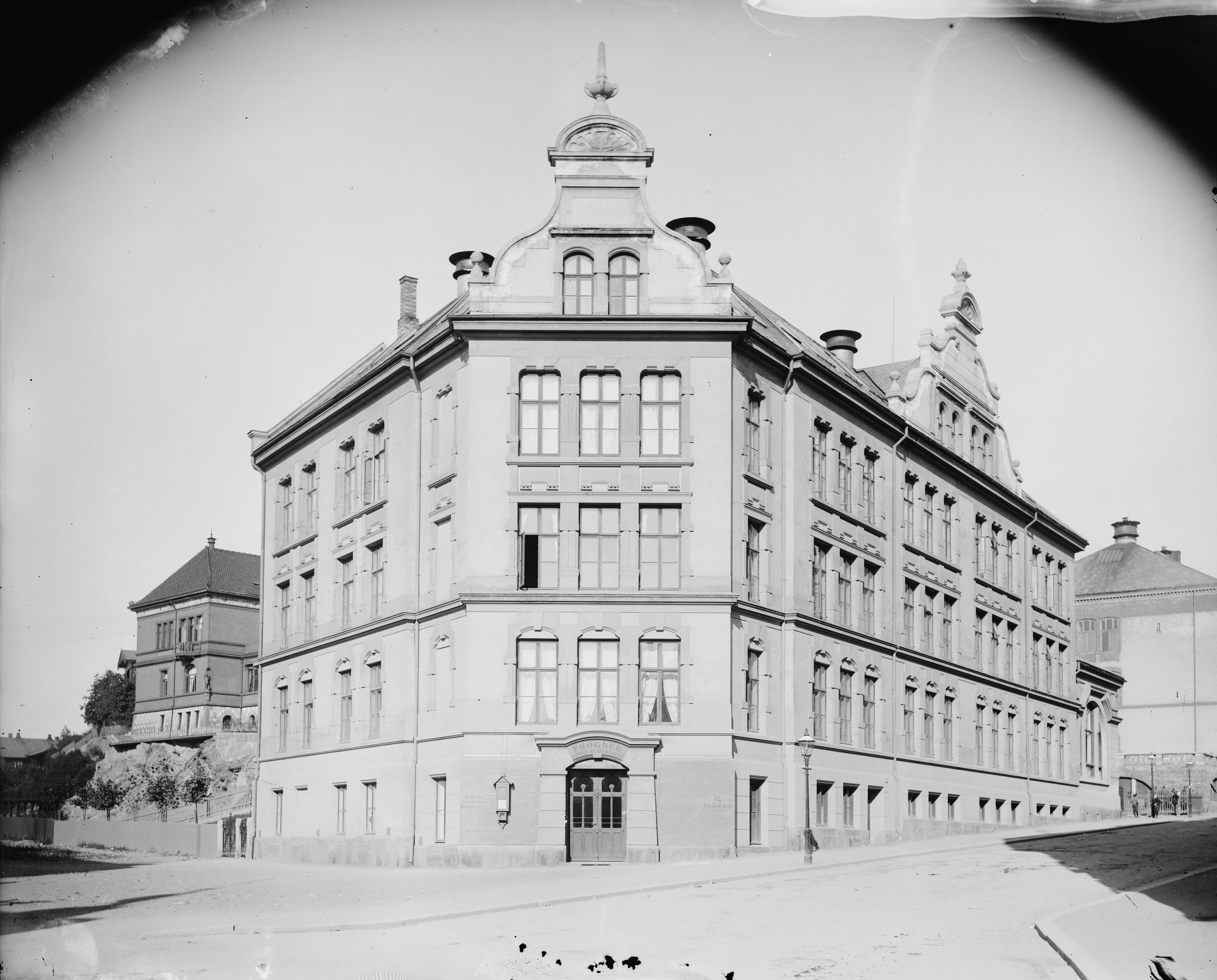 Påskrift negativ: 1. Oslo. Nils Juelsgt 52 Fot. Skøien [Riksantikvaren] Påskrift konvolutt: B-1 Oslo. Nils Juelsgate 52. Frogner høiere almenskole. [Riksantikvaren] Sted: Frogner Kommune: Oslo Fylke: Oslo Tagger: Frogner høiere almenskole skolebygning fasade